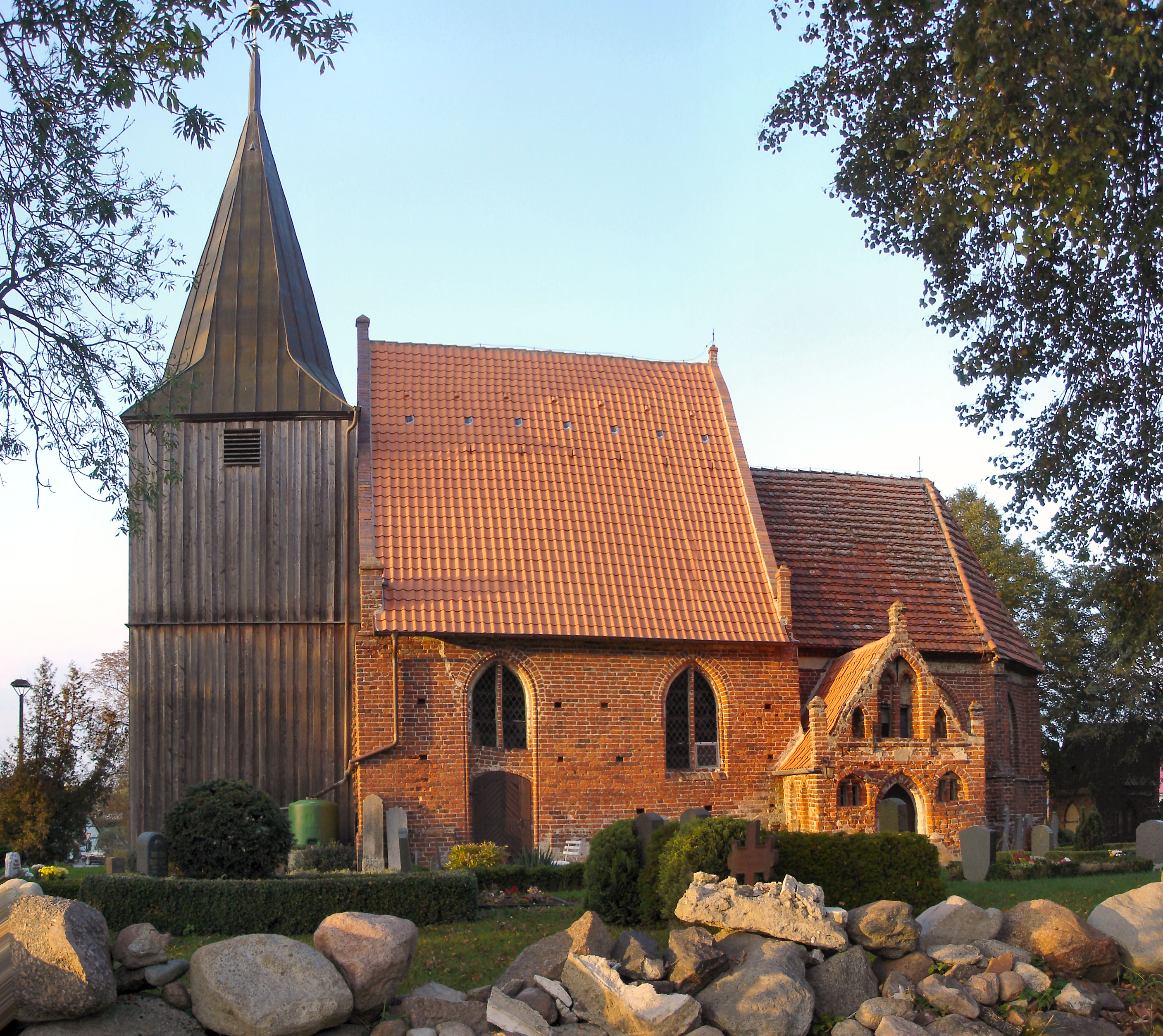 Kirche in Levenhagen bei Greifswald (Vorpommern) / Church in Levenhagen Western-Pomerania